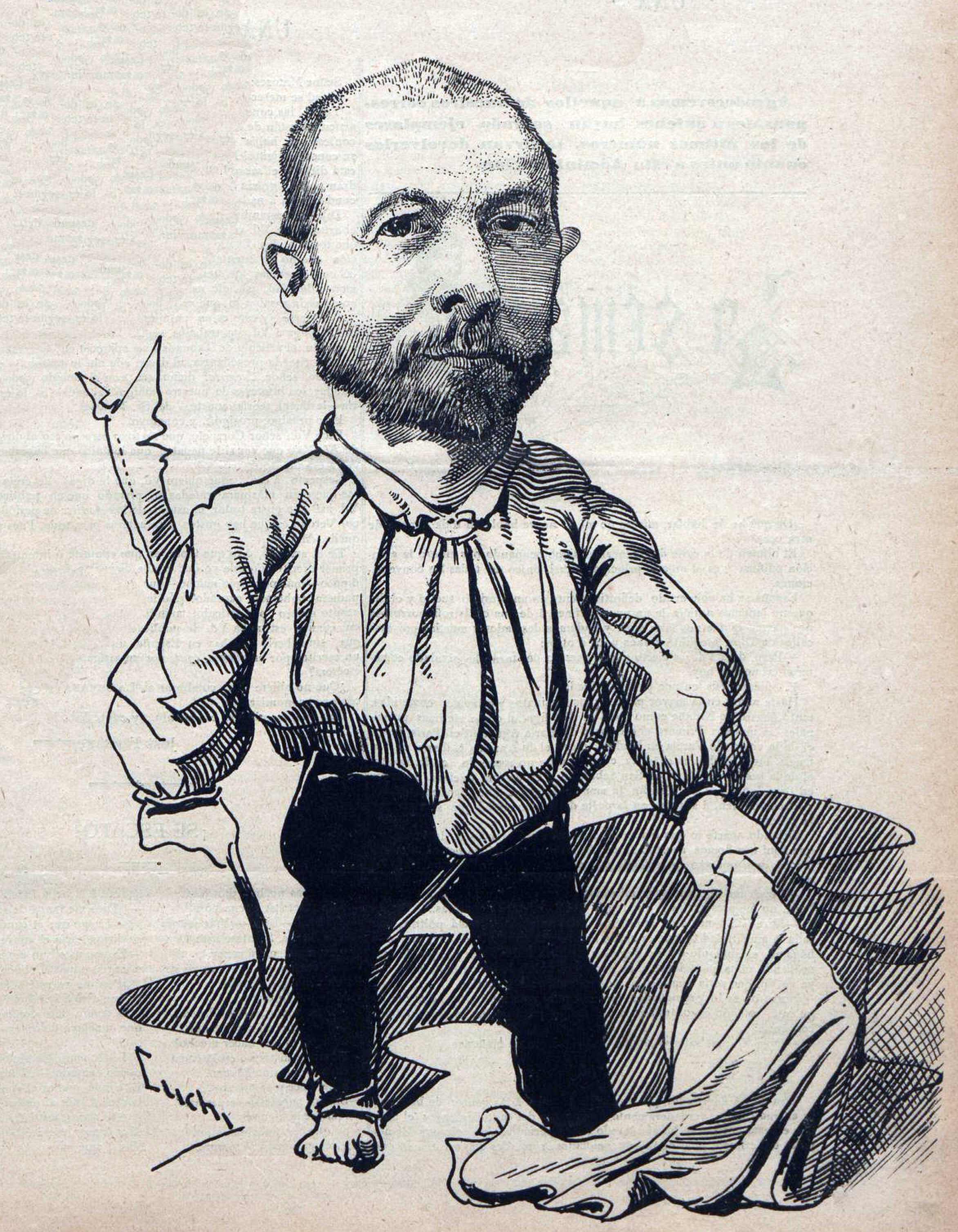 Antonio Peña Goiri.